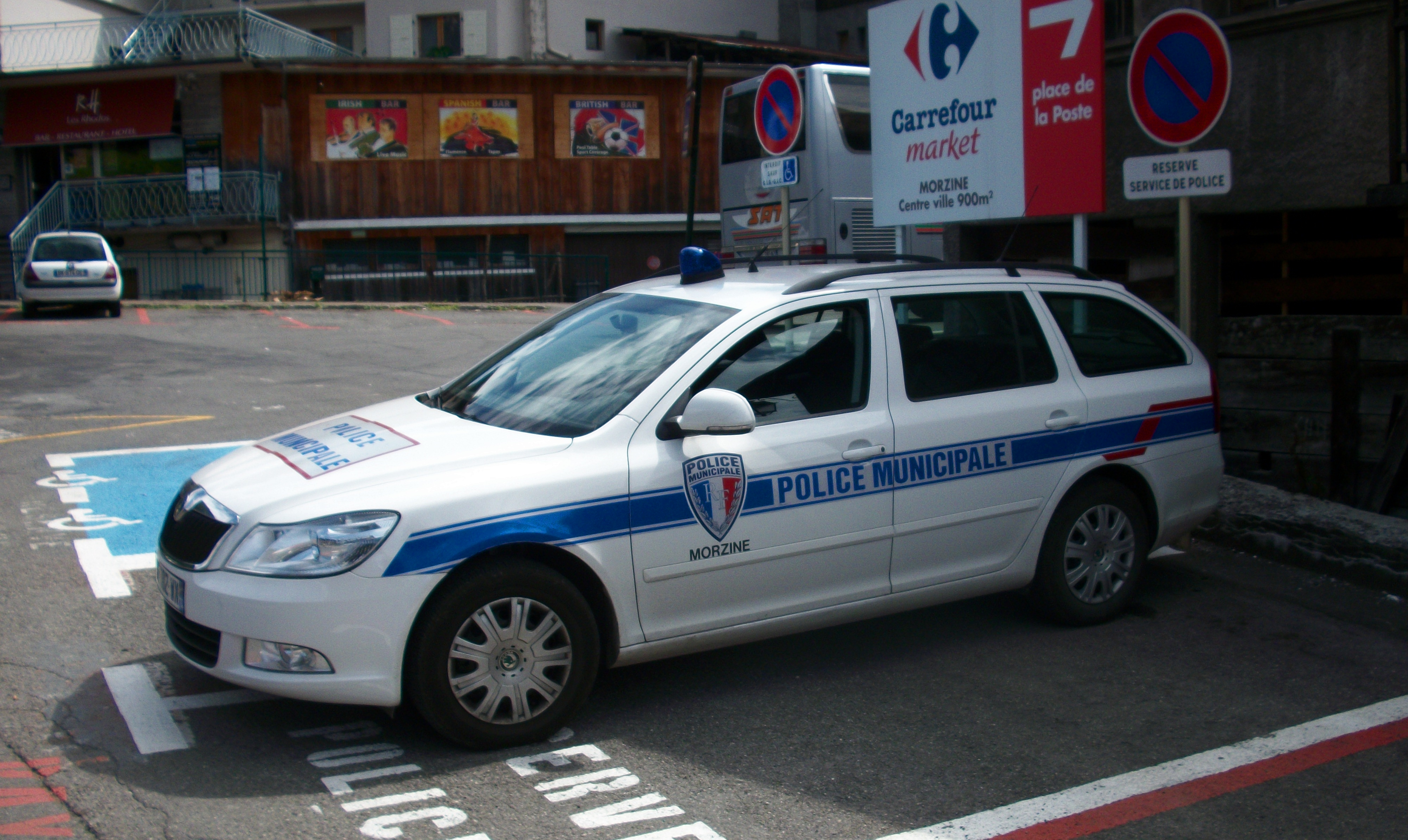 Škoda Octavia de la police municipale de Morzine